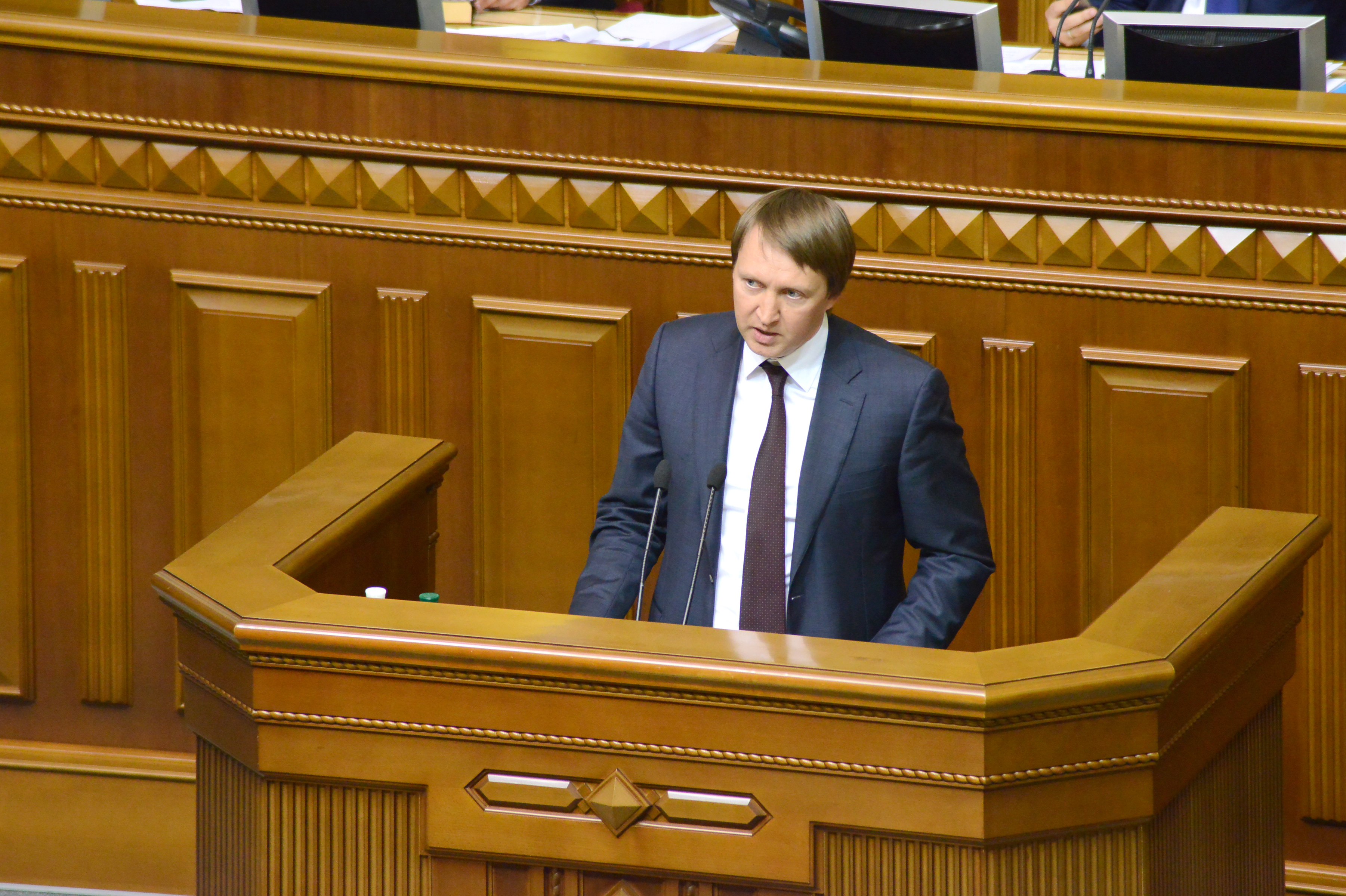 ВЕРХОВНА РАДА УКРАЇНИ 2015 фотограф Вадим Чуприна